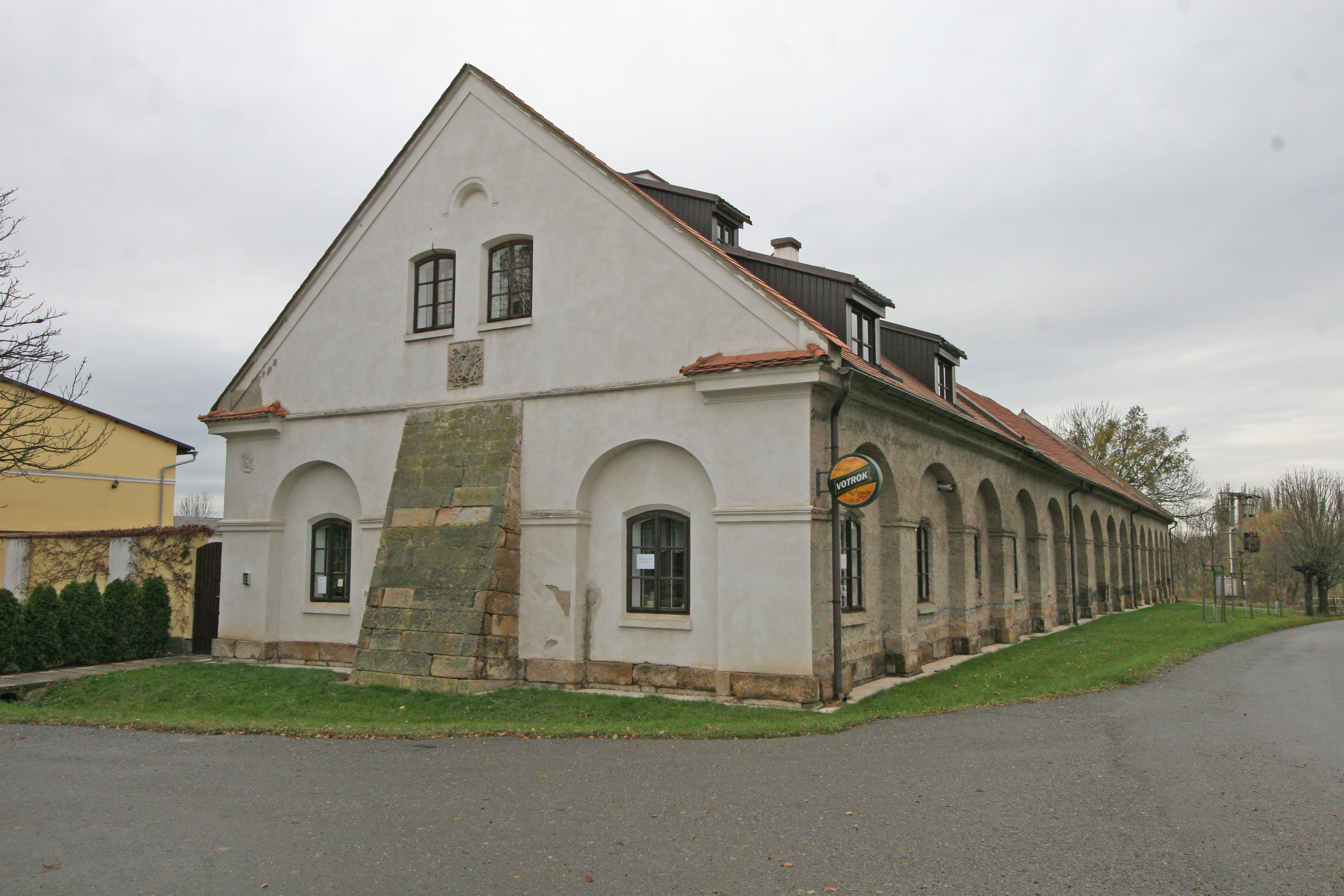 Venkovský dům (Chmelovice), v centru Chmelovic 1, Chmelovice